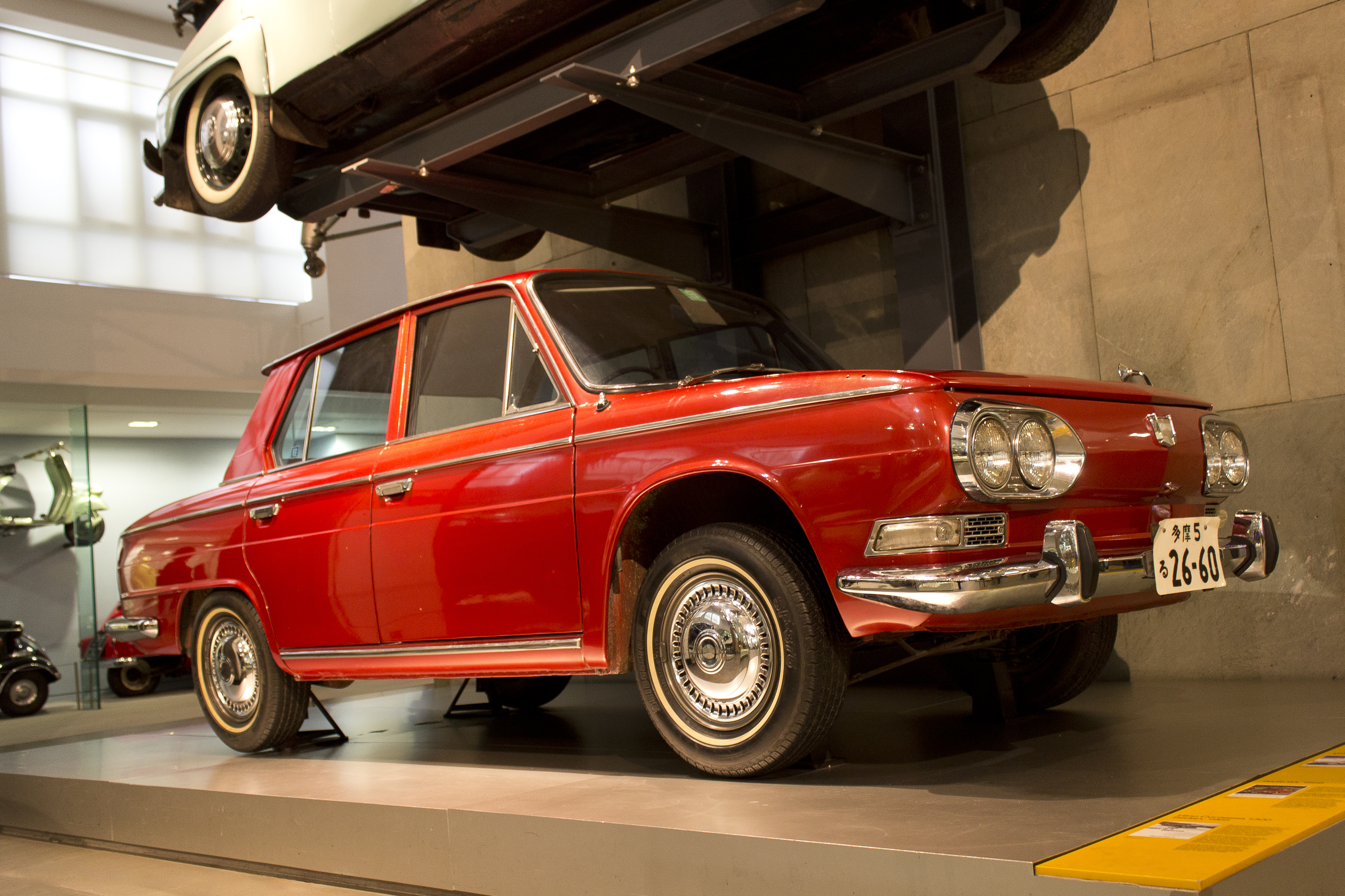 1964-1967 Hino Contessa 1300